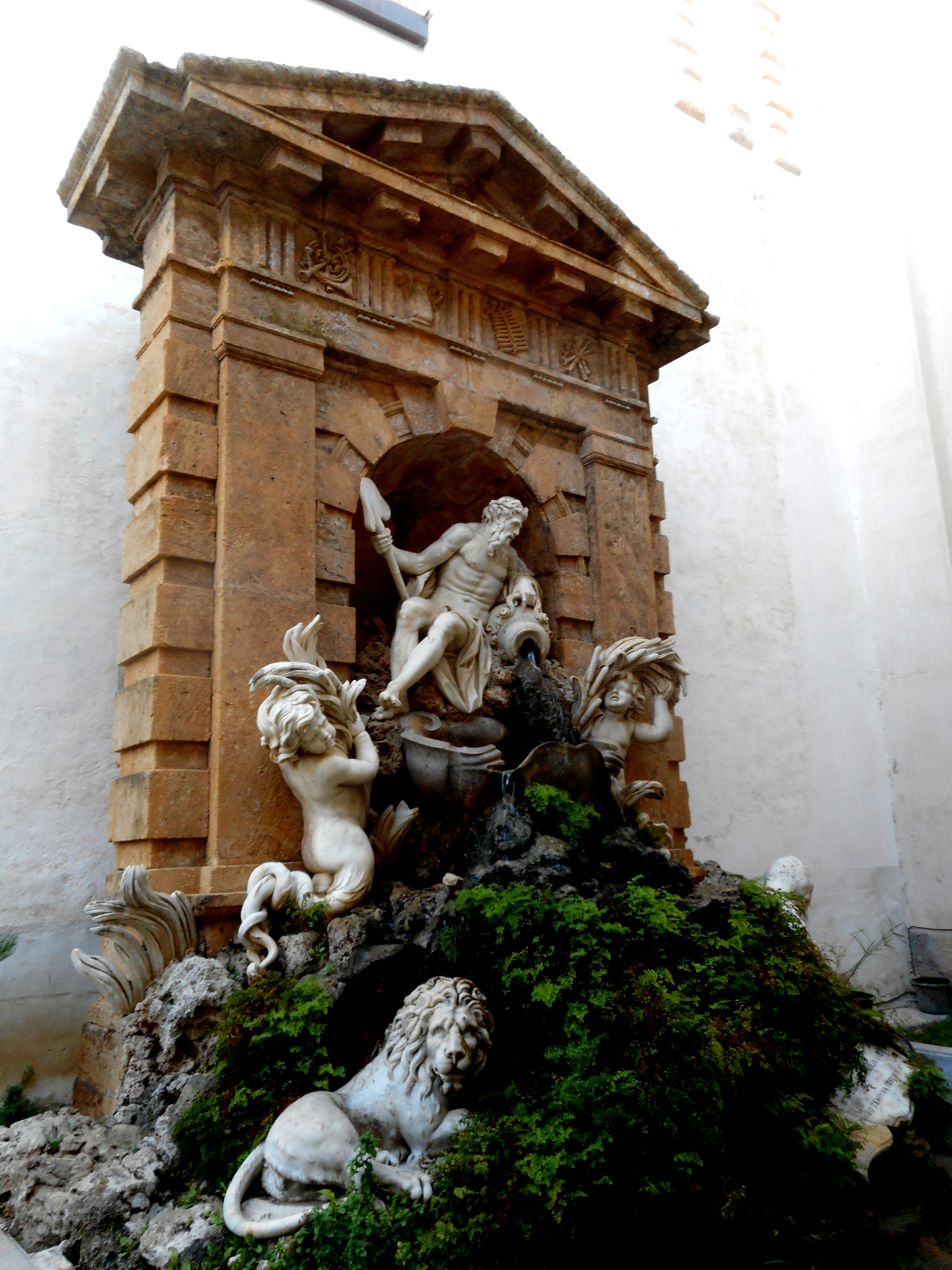 Fontana dell'Oreto nell'Abbazia di San Martino delle Scale opera di Ignazio Marabitti